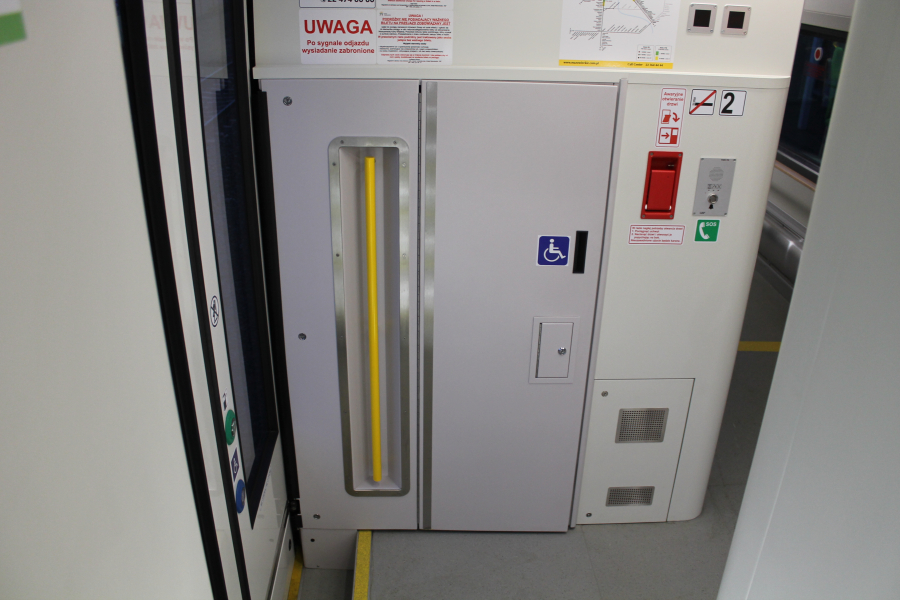 Rampa dla osób poruszających się na wózkach inwalidzkich w piętrowym wagonie sterowniczym Pesa Sundeck 316B-002.